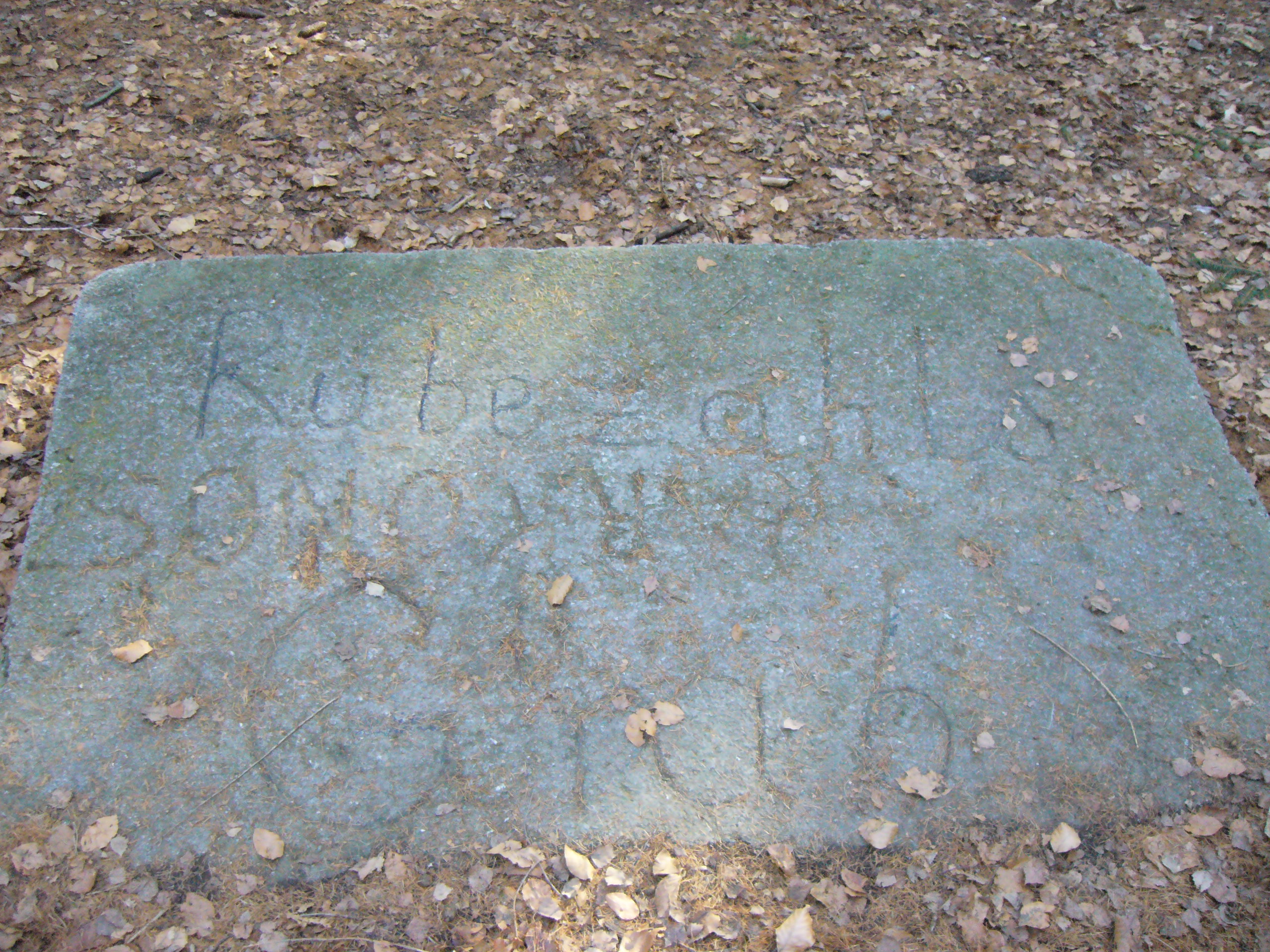 Symboliczny grób Krakonosza (Liczyrzepy, Rzepióra) w Szklarskiej Porębie. Pomiędzy napisem po niemiecku "do góry nogami" napis po czesku "Karkonos"